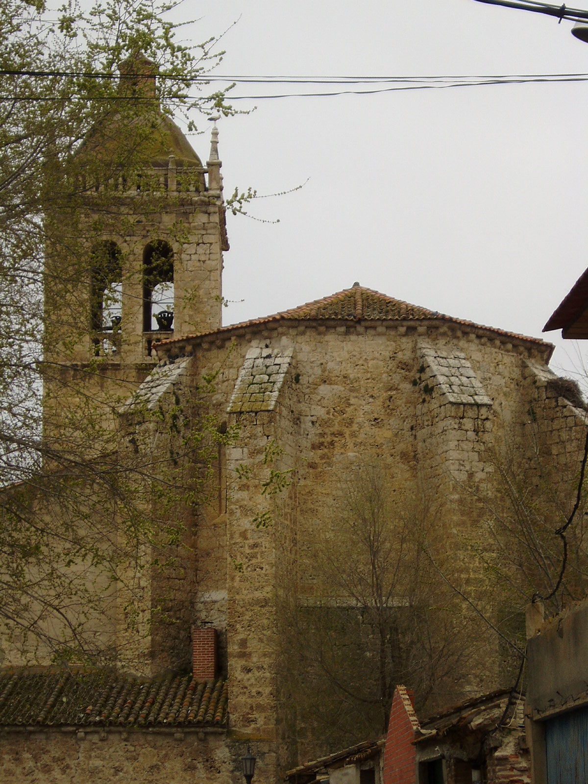 Iglesia de San Martín de Tours de Aldeamayor de San Martín